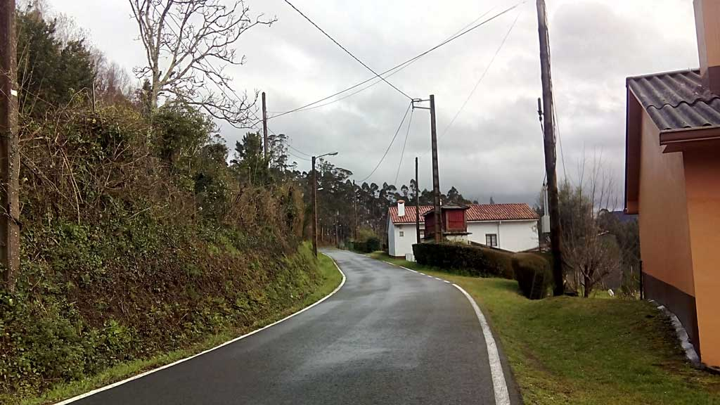 Vista da Costa, Doso, Narón.